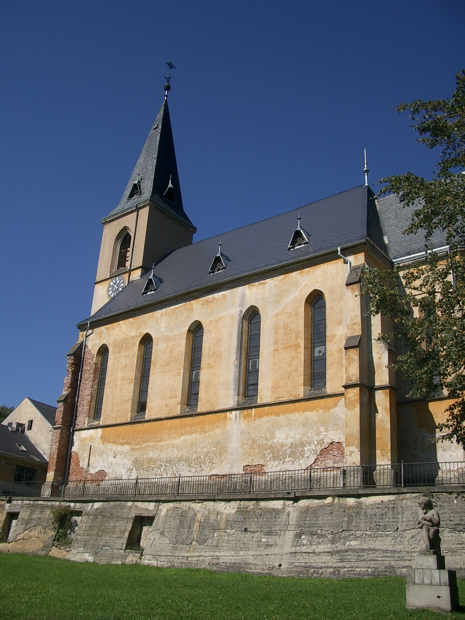 Kirche in Olovi (Bleistadt)